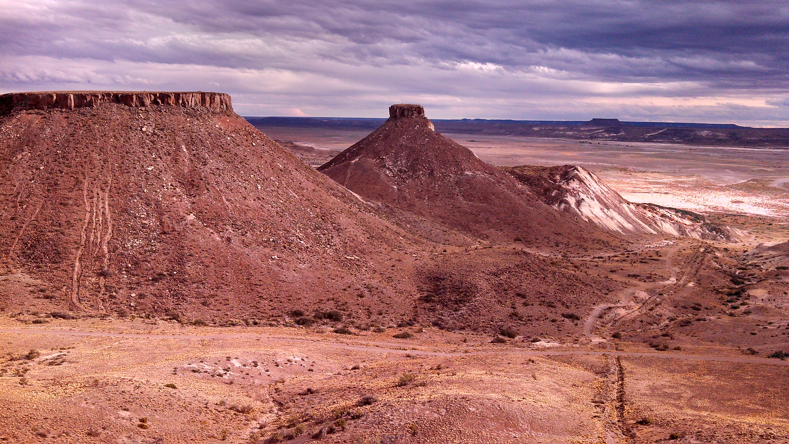 Fotografía del Cerro Pico Truncado, que da origen al nombre de la ciudad. De fondo el Valle del Río Deseado y el Macizo del Deseado.